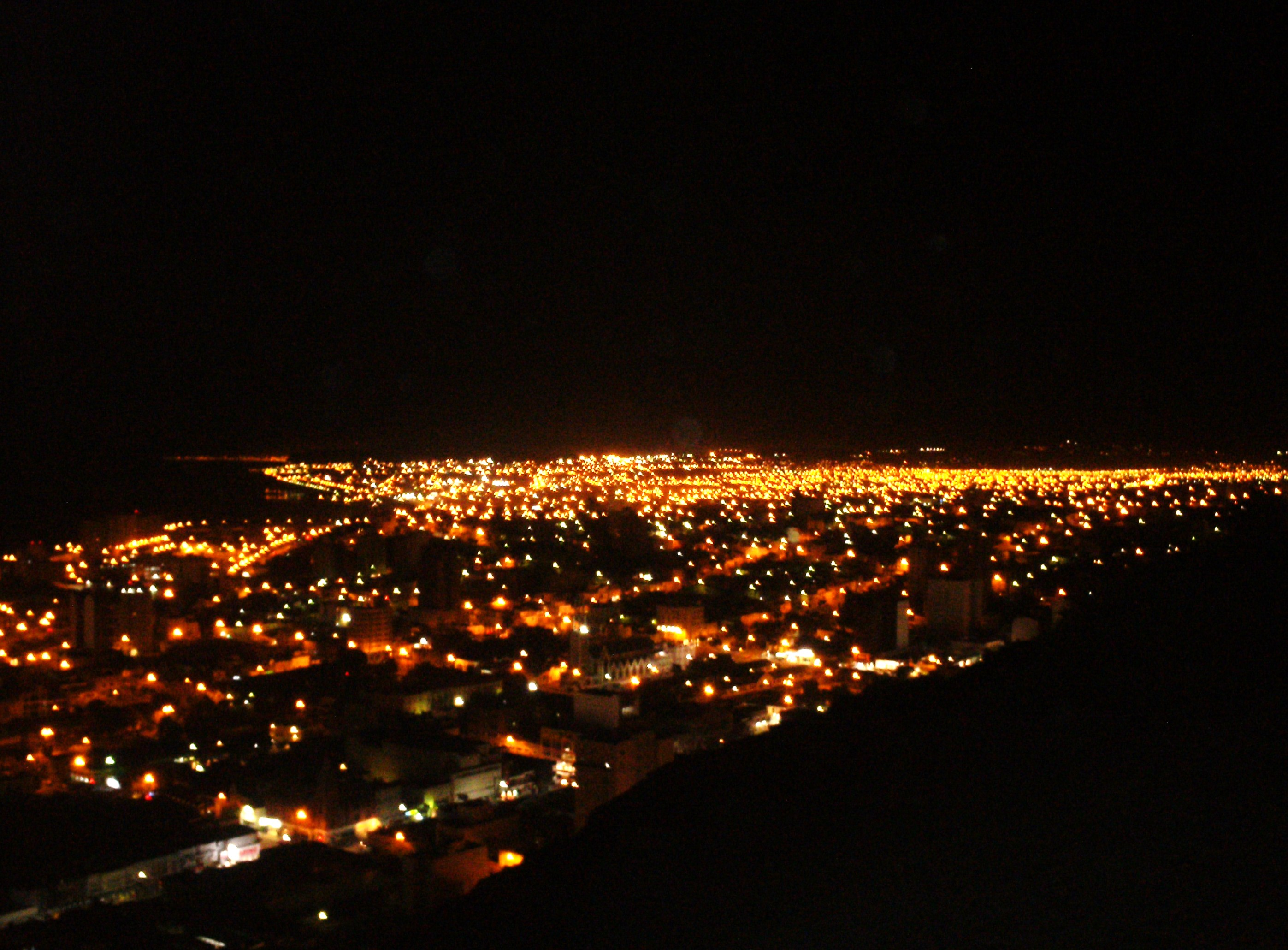 desde el mirador del chenque la inmensidad comodorense